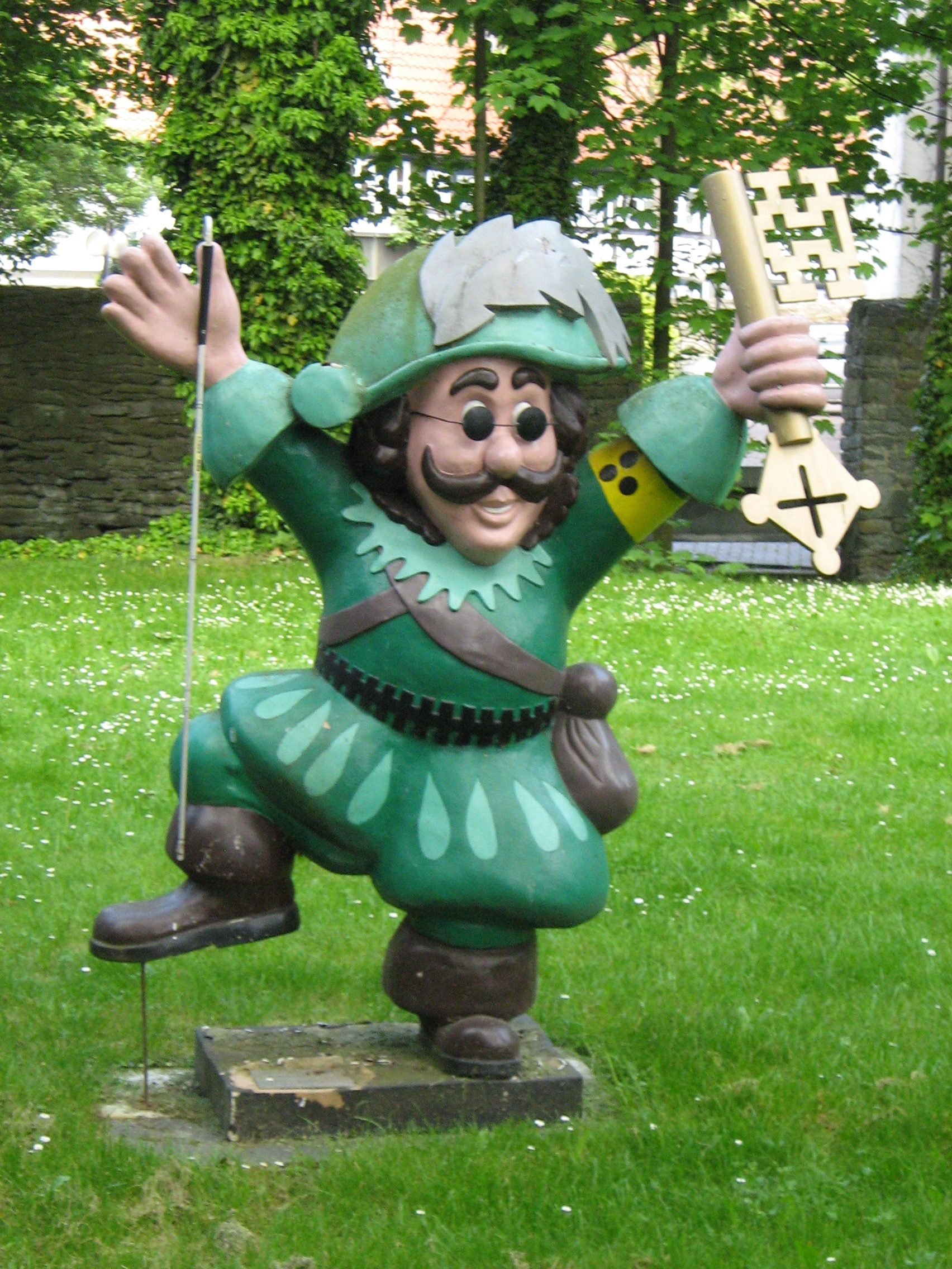 Das Jägerken von Soest als Figur des Stadtmarketing – die Gestaltung dieses Jägerkens, das in der Nähe der Teichsmühle steht, weist auf die Westfälischen Blindenschulen in Soest hin